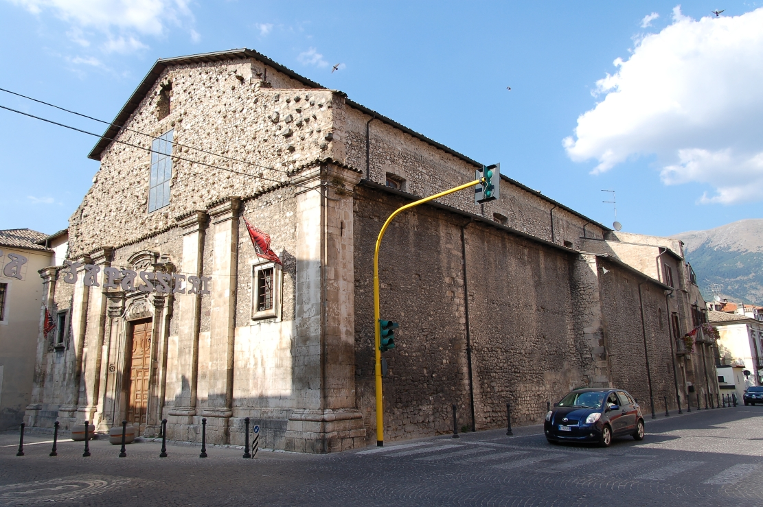 Sulmona 2011